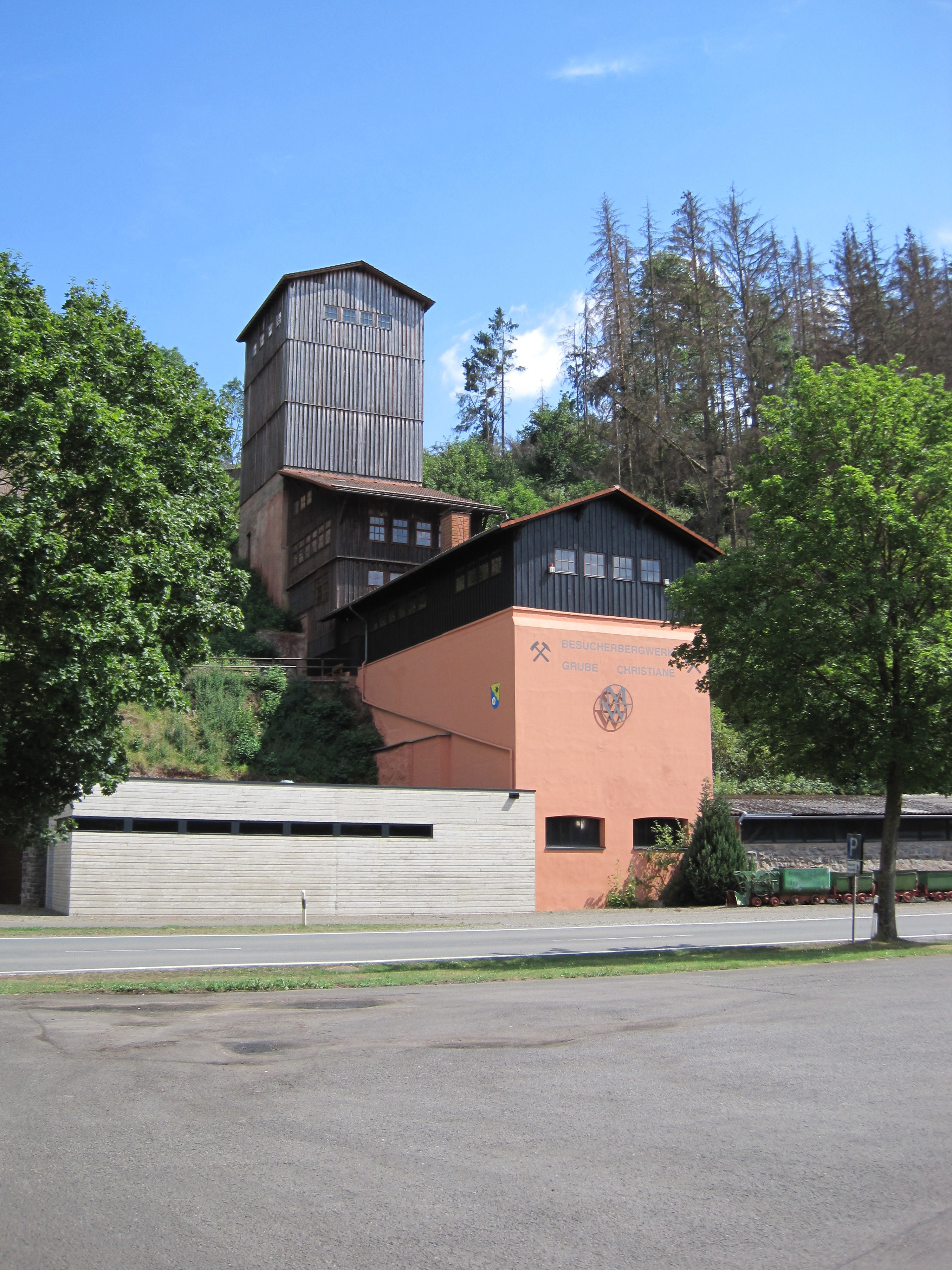 Ehemalige Aufbereitungsanlage der Grube Christiane/Schachtanlage Martenberg, heute Besucherbergwerk. Adorf, Gemeinde Diemelsee, Hessen